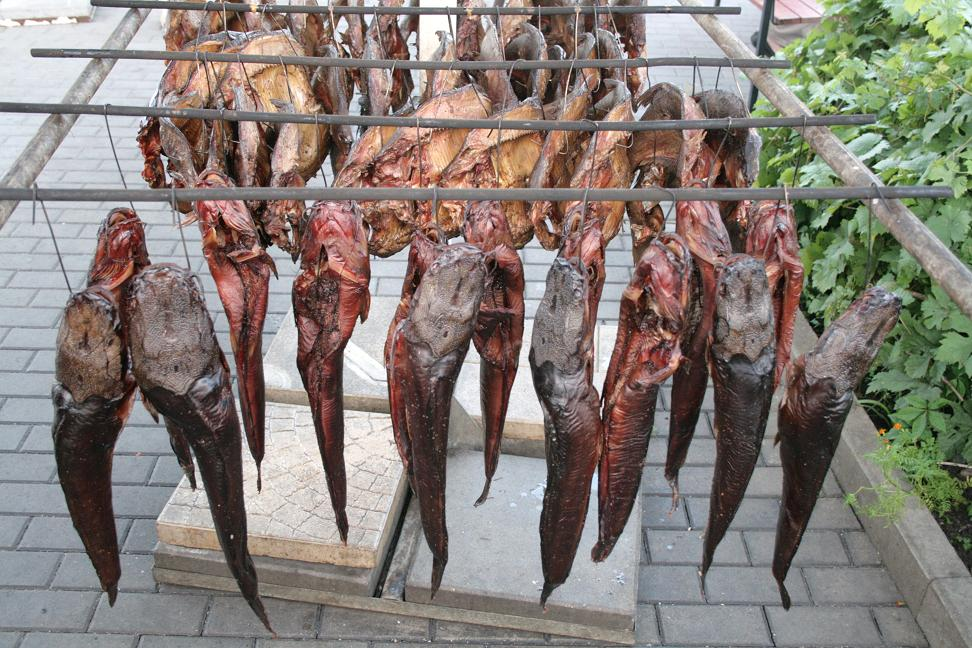 Nida, Lithuania